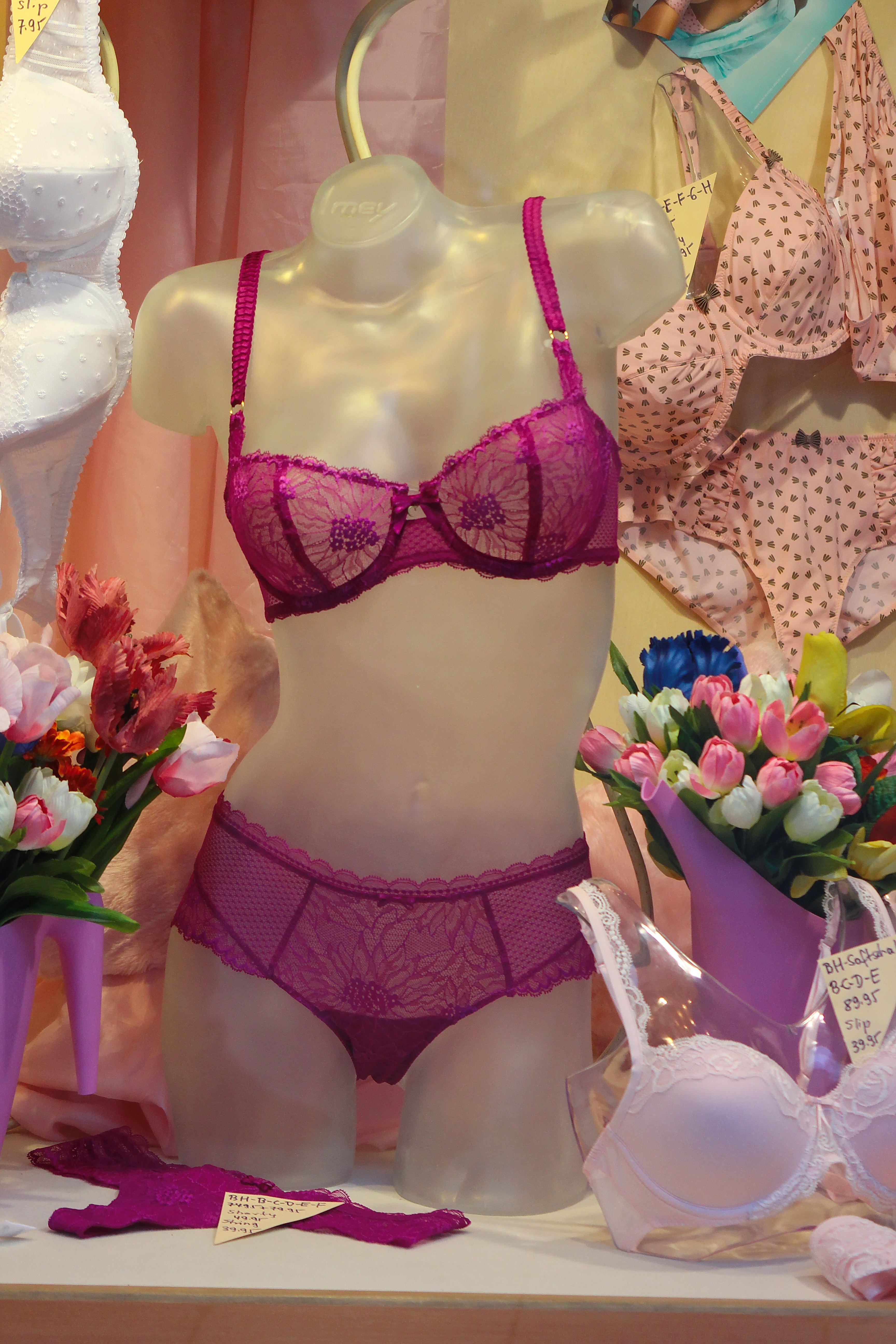 BH und Schlüpfer in einem Schaufenster